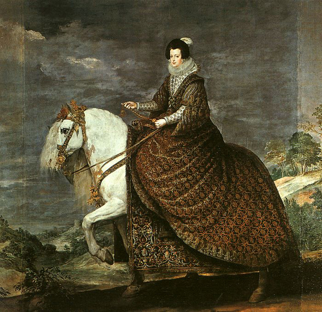 Retrato ecuestre de la reina Isabel de Borbón (1602-1644), que fue hija del rey Enrique IV de Francia y reina consorte de España por su matrimonio con el rey Felipe IV de España.